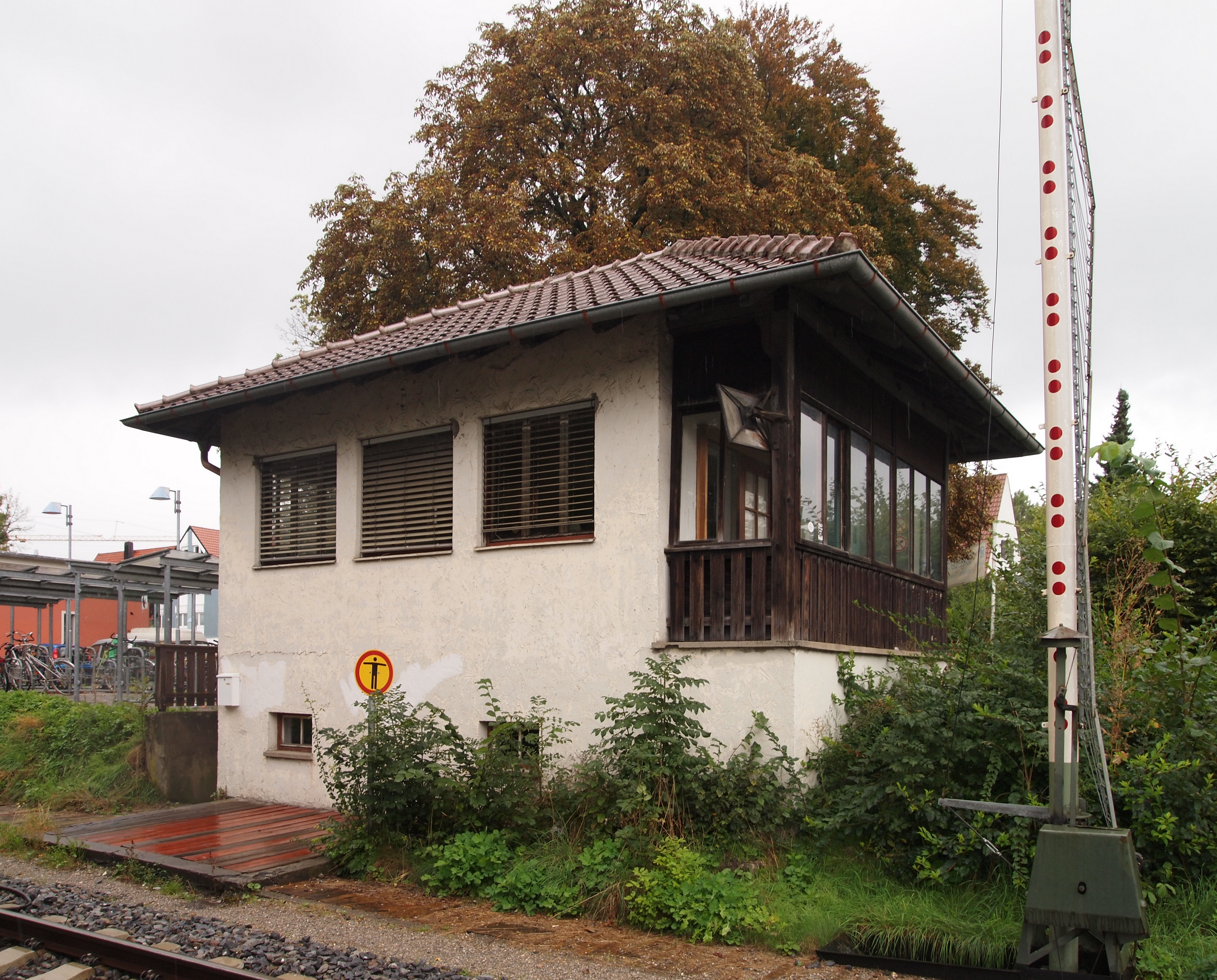 Fahrdienstleiter-Stellwerk 2 - Stw 2 mit Bahnübergang bei KM 0,085 der Bahnstrecke Landsberg am Lech-Schongau (Fuchstalbahn) von der Katherinenstraße aus. Bauhahr 1951, mechanisches Stellwerk. Seit 2007 ist dieses Stellwerk das einzige noch in Betrieb befindliche Stellwerk des Bahnhofs Landsberg am Lech.